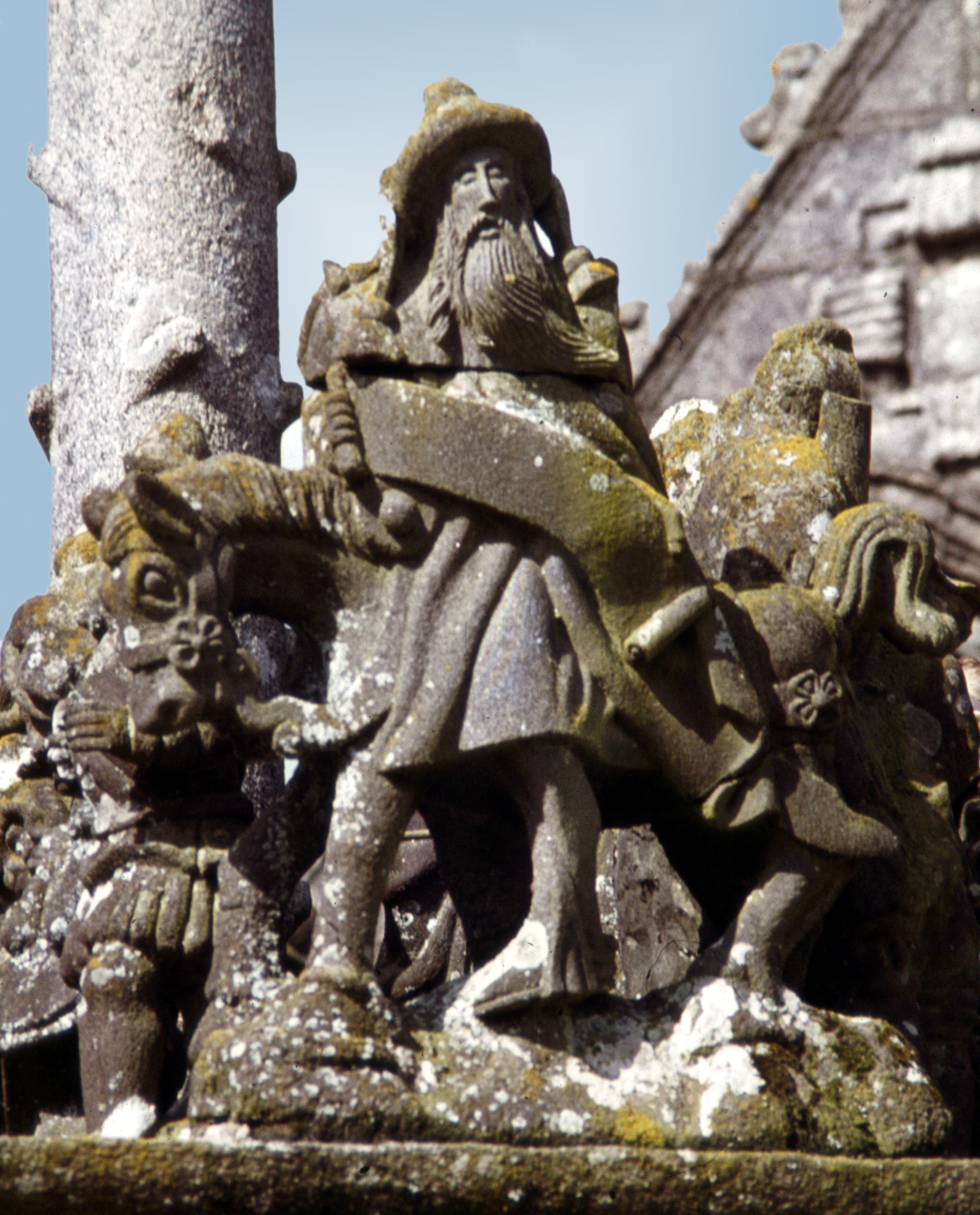 Guimiliau